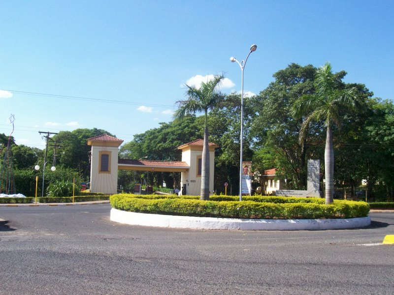 Unilins - Centro Universitário de Lins